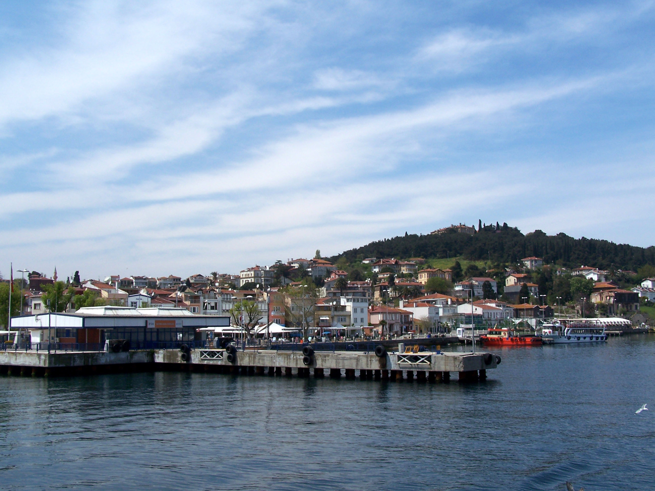 Heybeliada